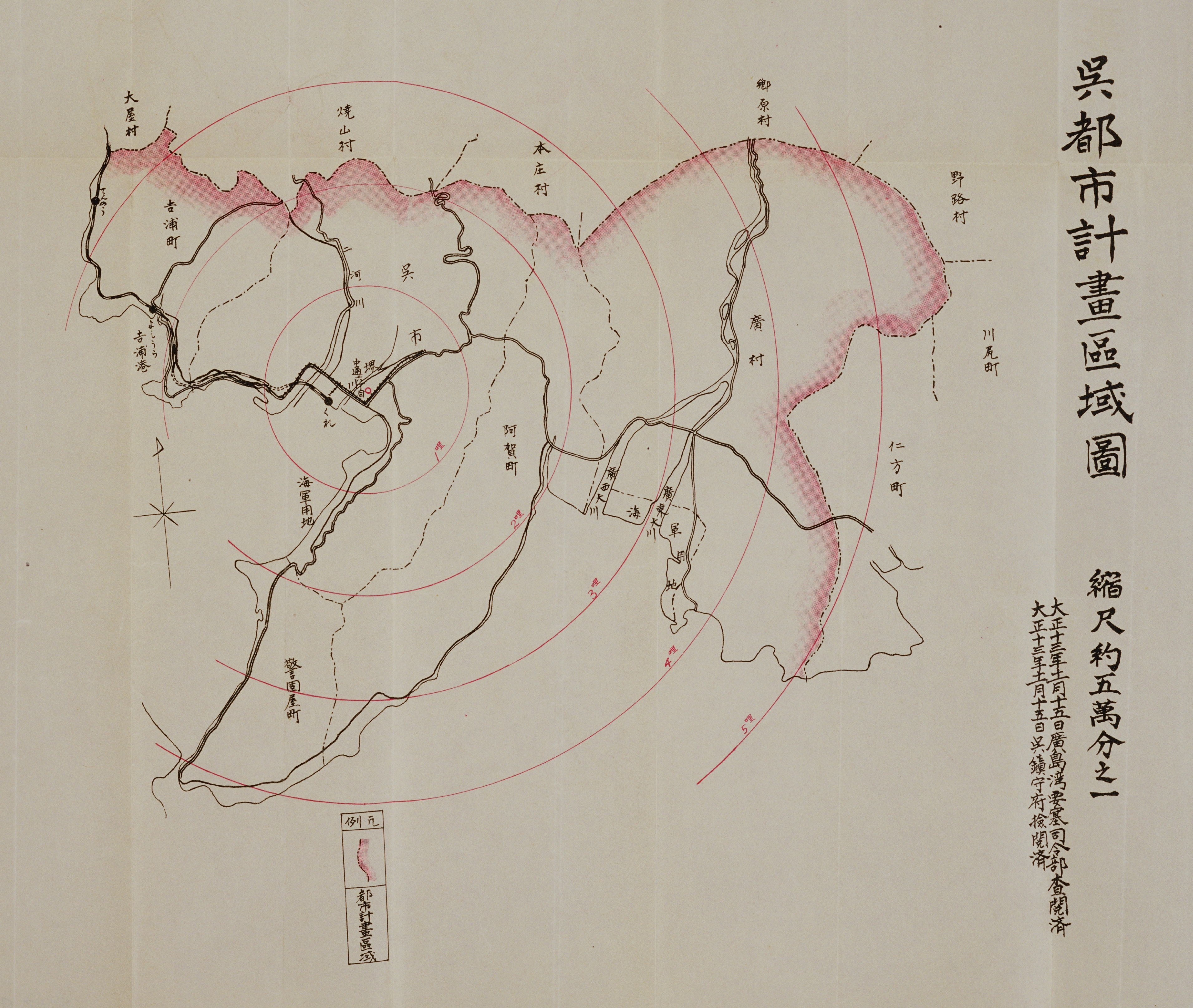 呉都市計画区域図 , 1924年（大正13年）呉市作成